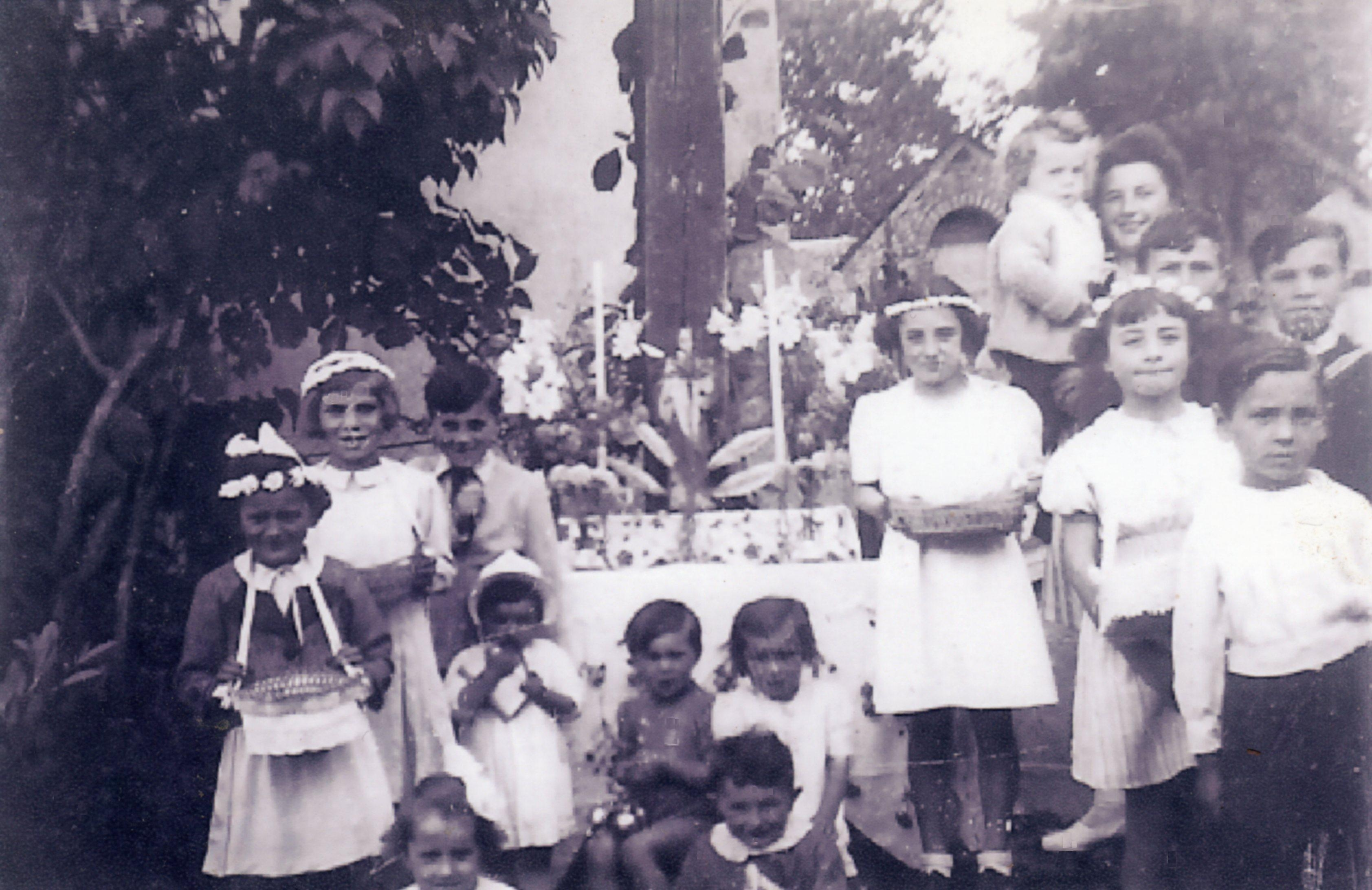 Jeunesse du village de Bourréac (Canton de Lourdes-Est) posant, en mai-juin 1945, devant le reposoir de la Fête-Dieu qui était dressé devant la croix hosannière située à l'angle de l'entrée de la maison Pouzadé (dont le nom signifie reposoir en dialecte gascon), à l'entrée du chemin de Récahorts.